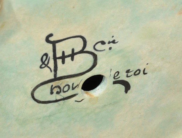 Marque Louis Boulenger-Hyppolite Hautin et Cie, Choisy-le-Roi, vers 1860, France